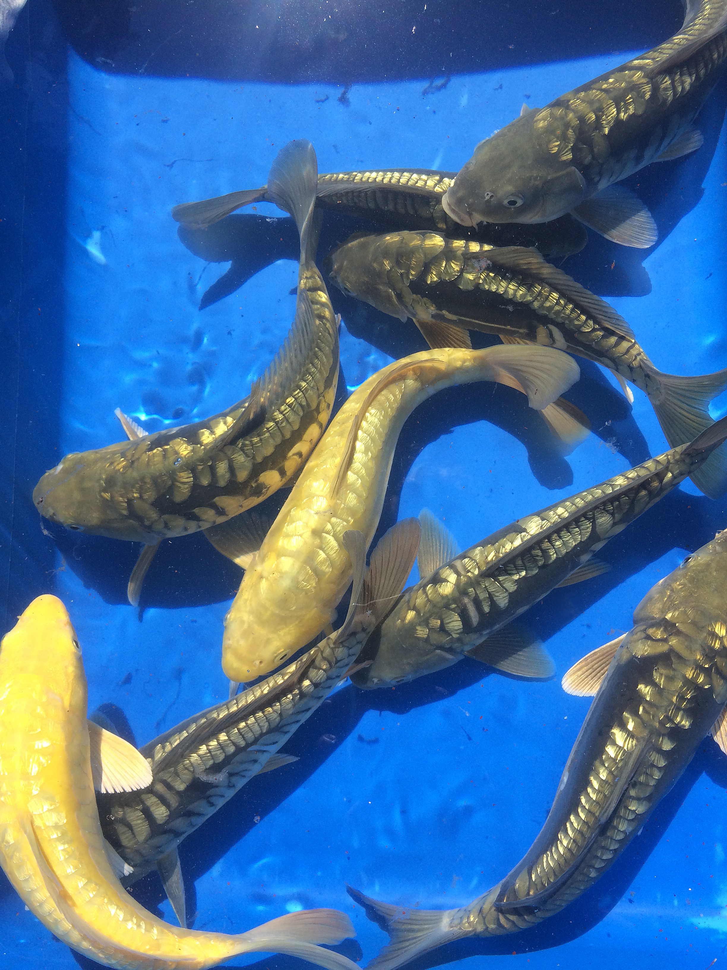 Züchter Yusuf Hermansyah, Samudra Koifarm, Jawa Timur